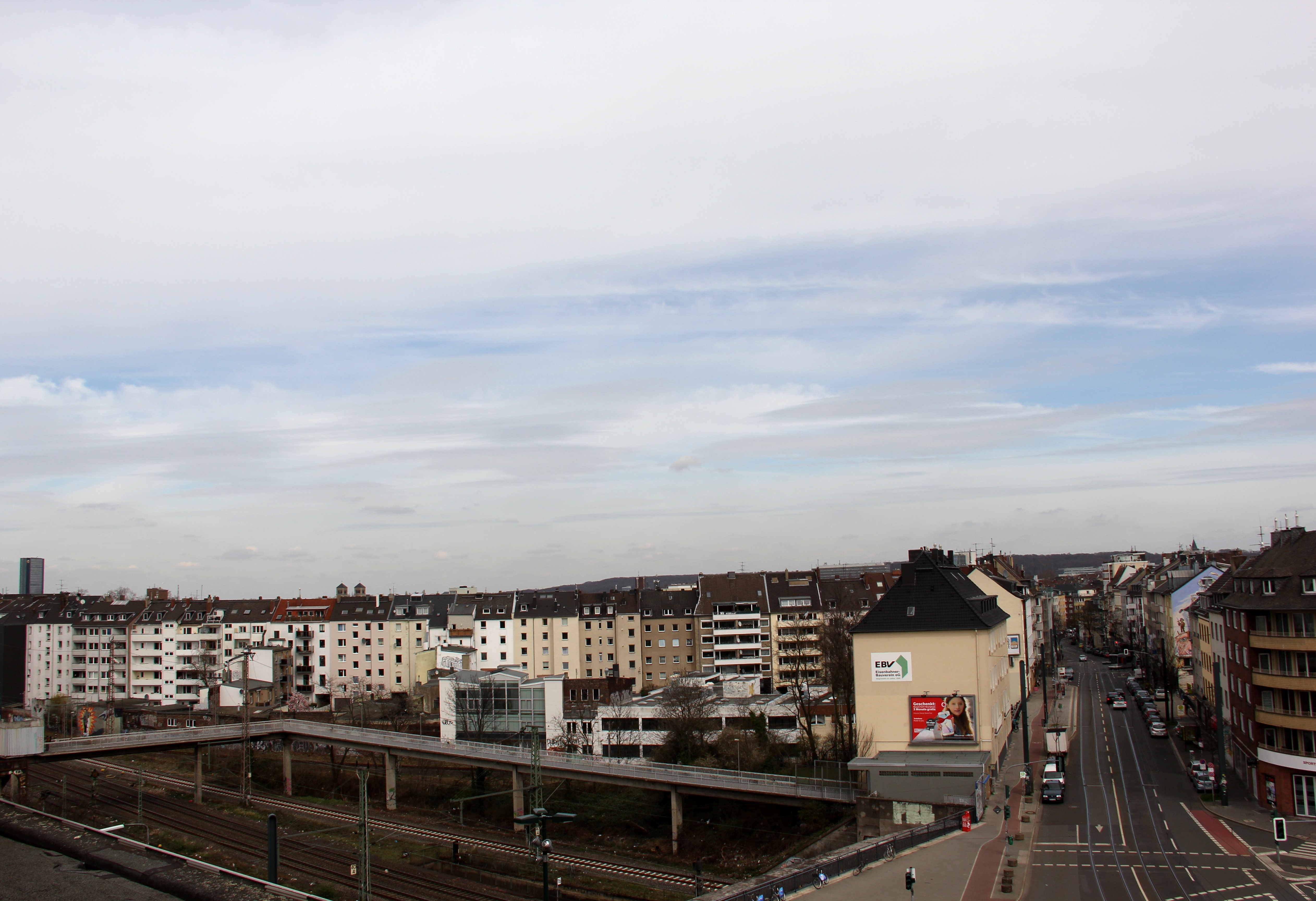 Der Zugang Ackerstraße zum Bahnhof Düsseldorf Wehrhahn vom Vinzenzplatz aus fotografiert (Blickrichtung: Nord-Ost)